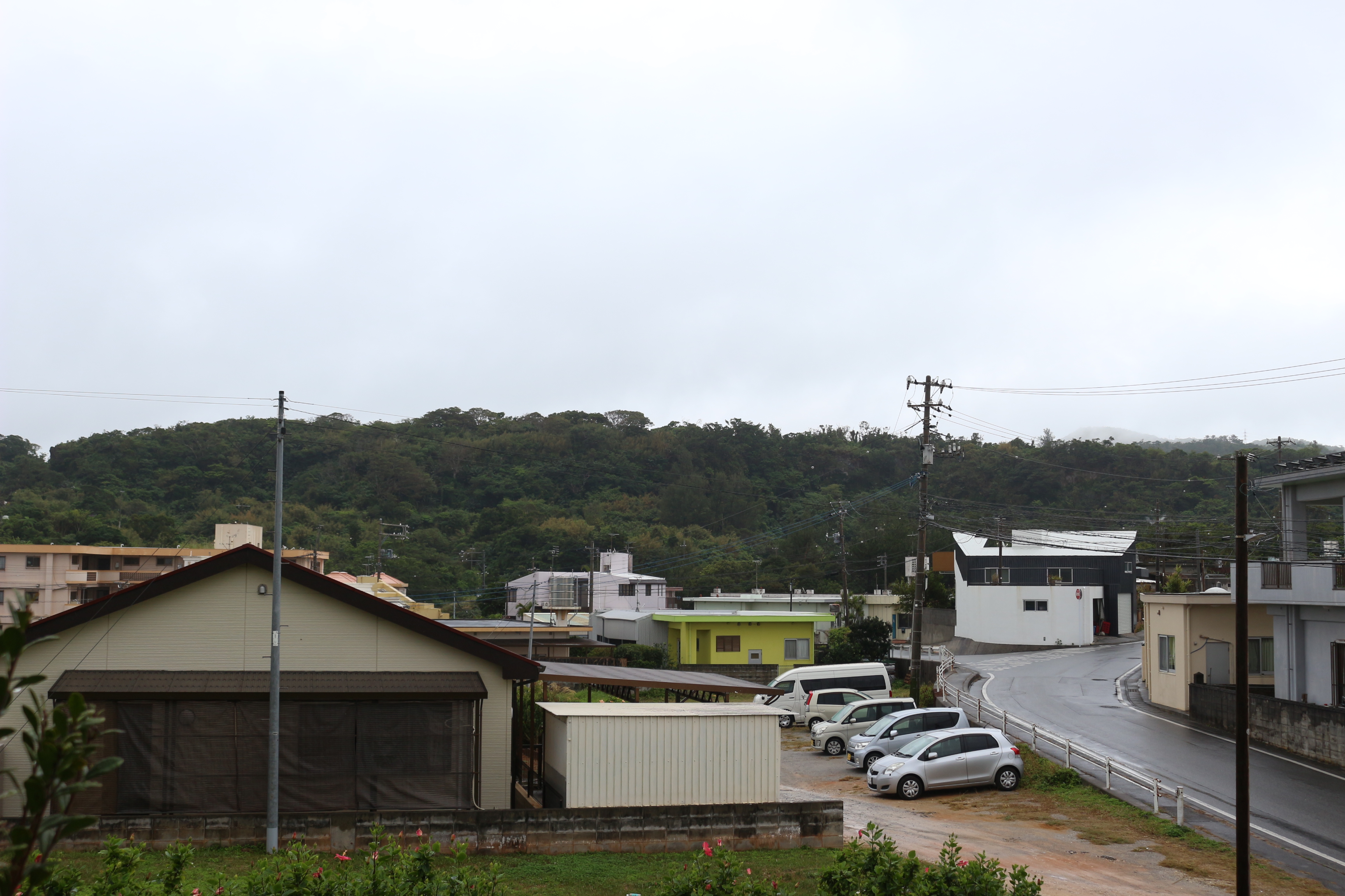 沖縄県国頭郡恩納村にある山田城 (グスク) の現在